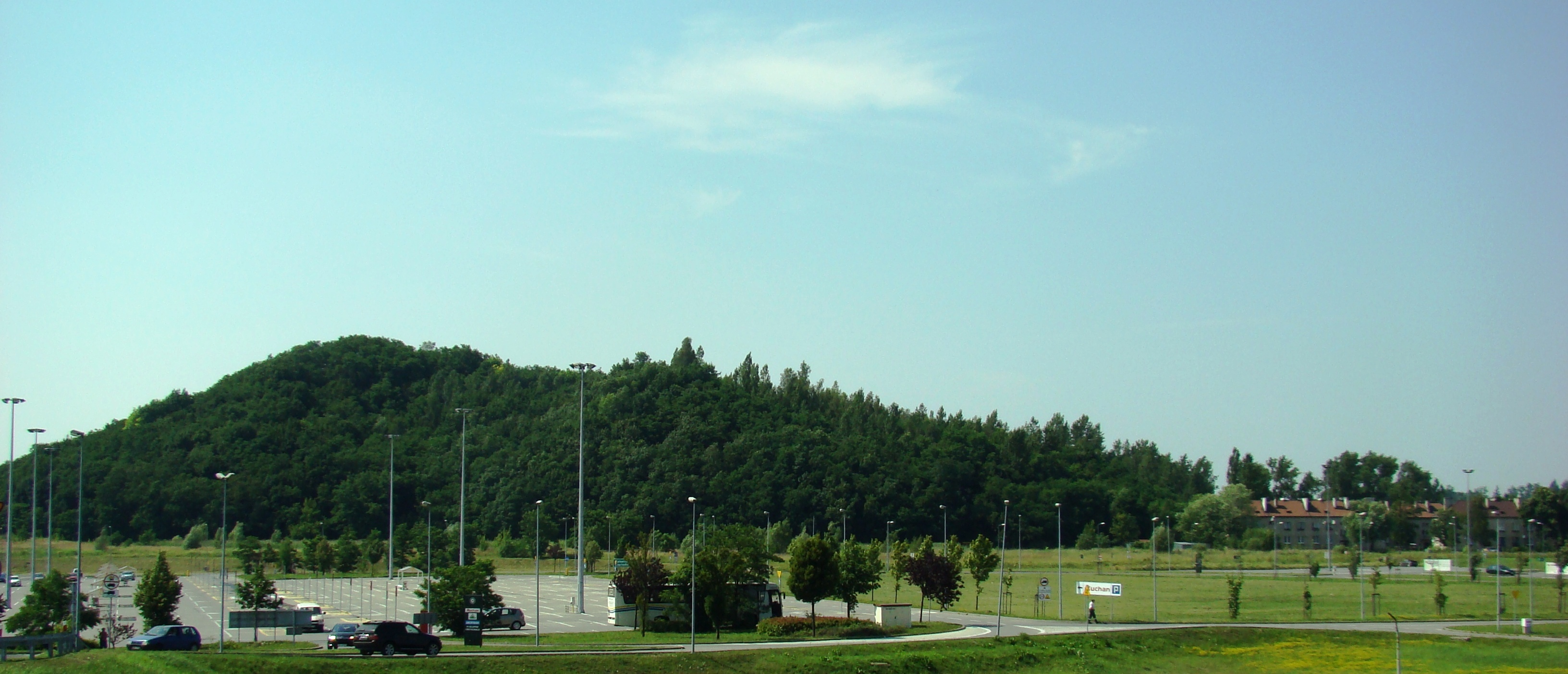 hałda kopalni rud żelaza "Tadeusz II" w Nowej Wsi, 301 m n.p.m., po prawej bloki pracowników